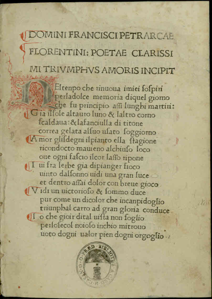 Trionfi. - [Firenze] : magister Ihoannes (!) Petri de Magontia scripsit hoc opus, Die XXII Februarii [1473]. - 46 c. ; 4º. - La data 1473 è desunta dalla filigrana .